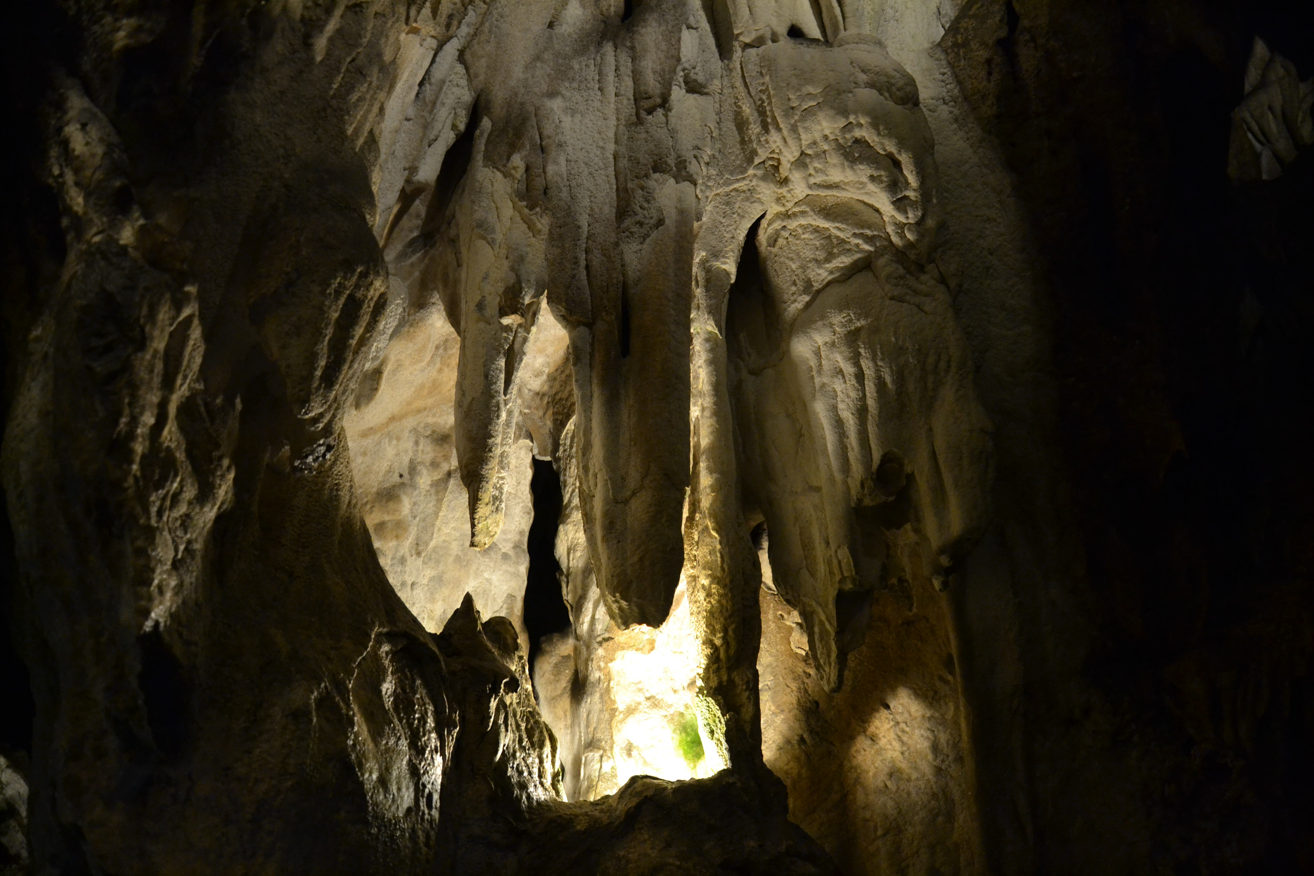 Hermannshöhle - stalagtites